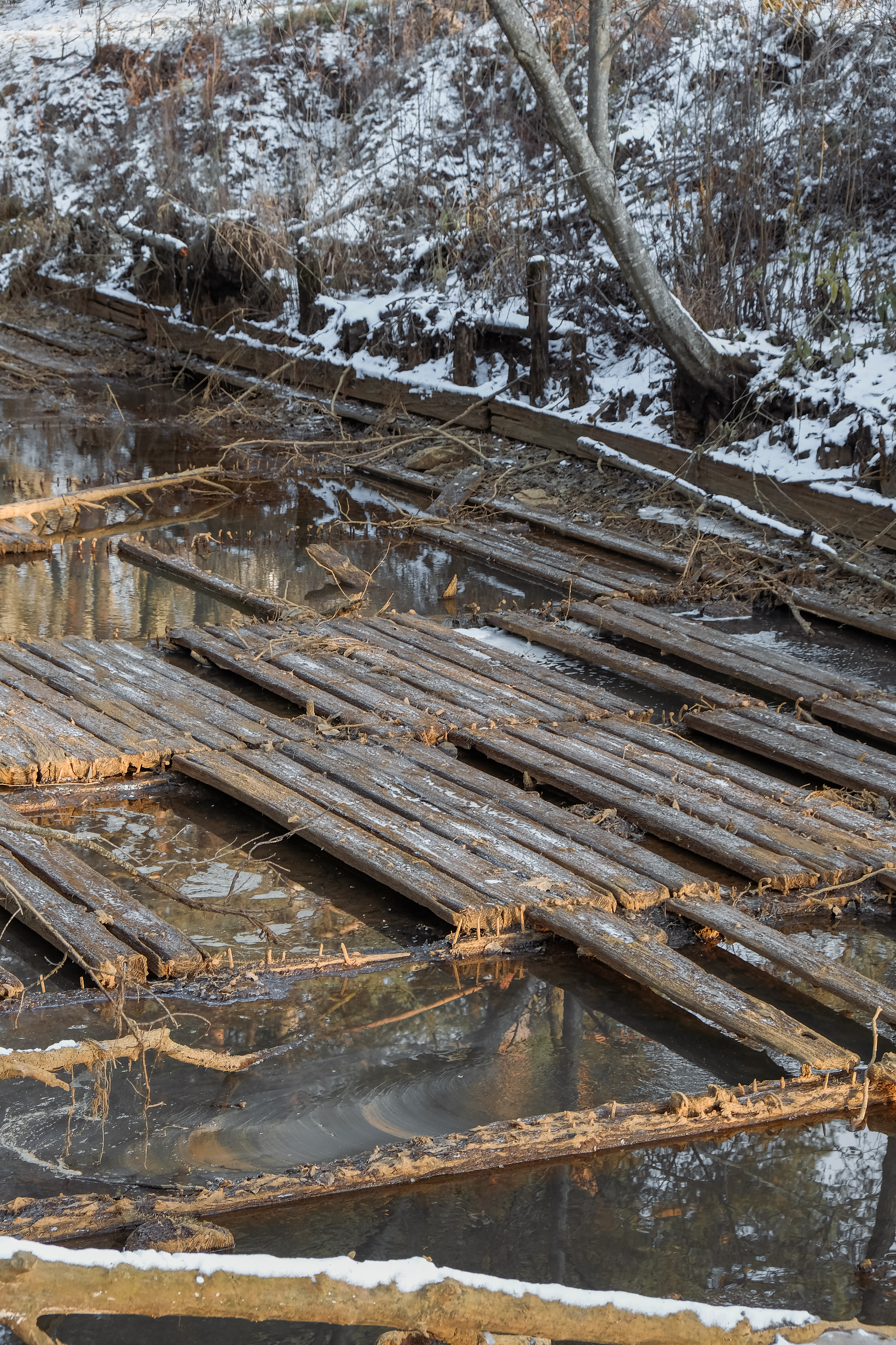 Fragmentāri pārpalikusī koka grīda kanālā pie ietekas Mazajā Baltezerā